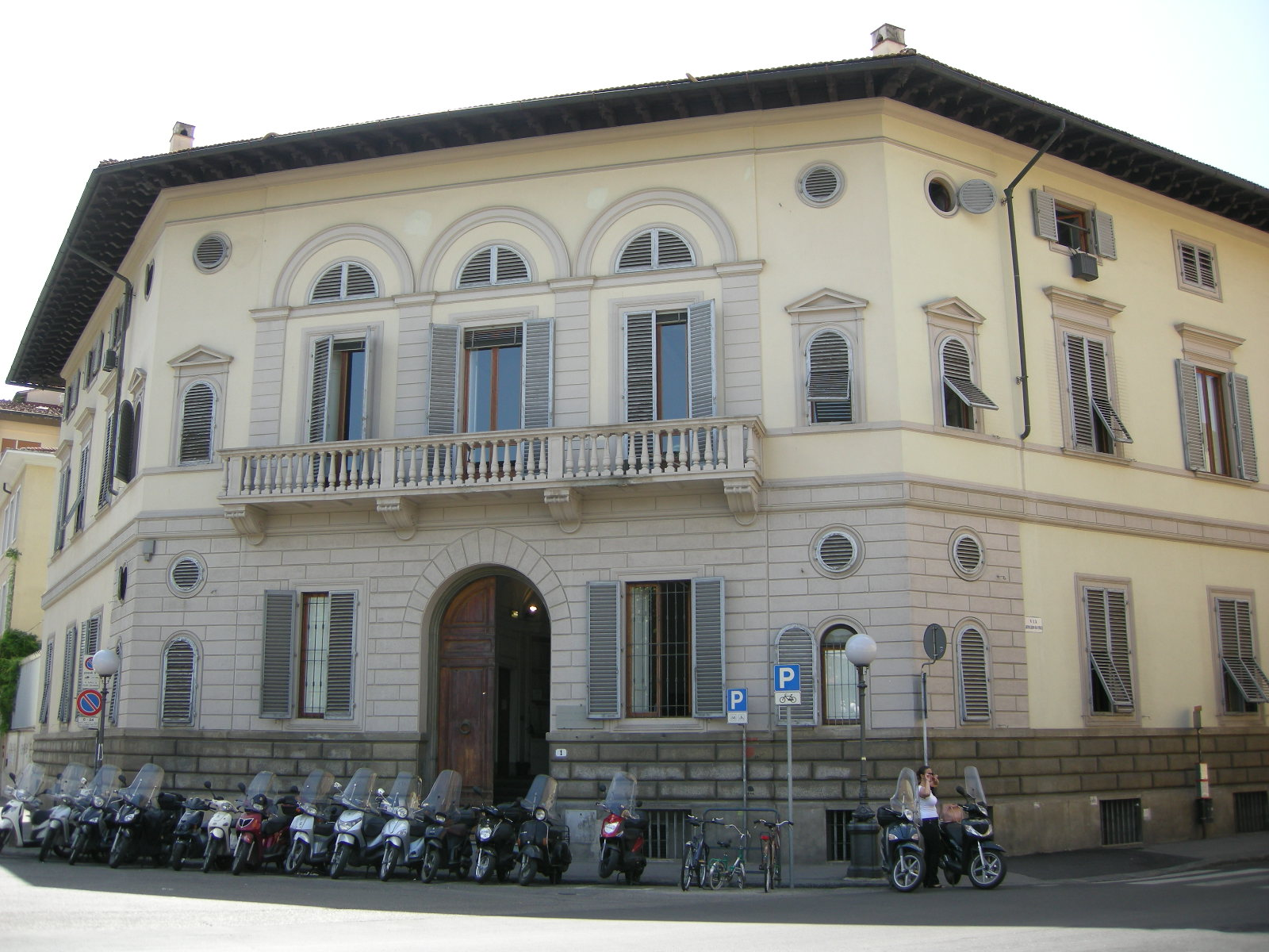 Dipartimento di italianistica (Firenze) esterno